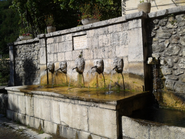 Fonte d'Auta nel borgo antico